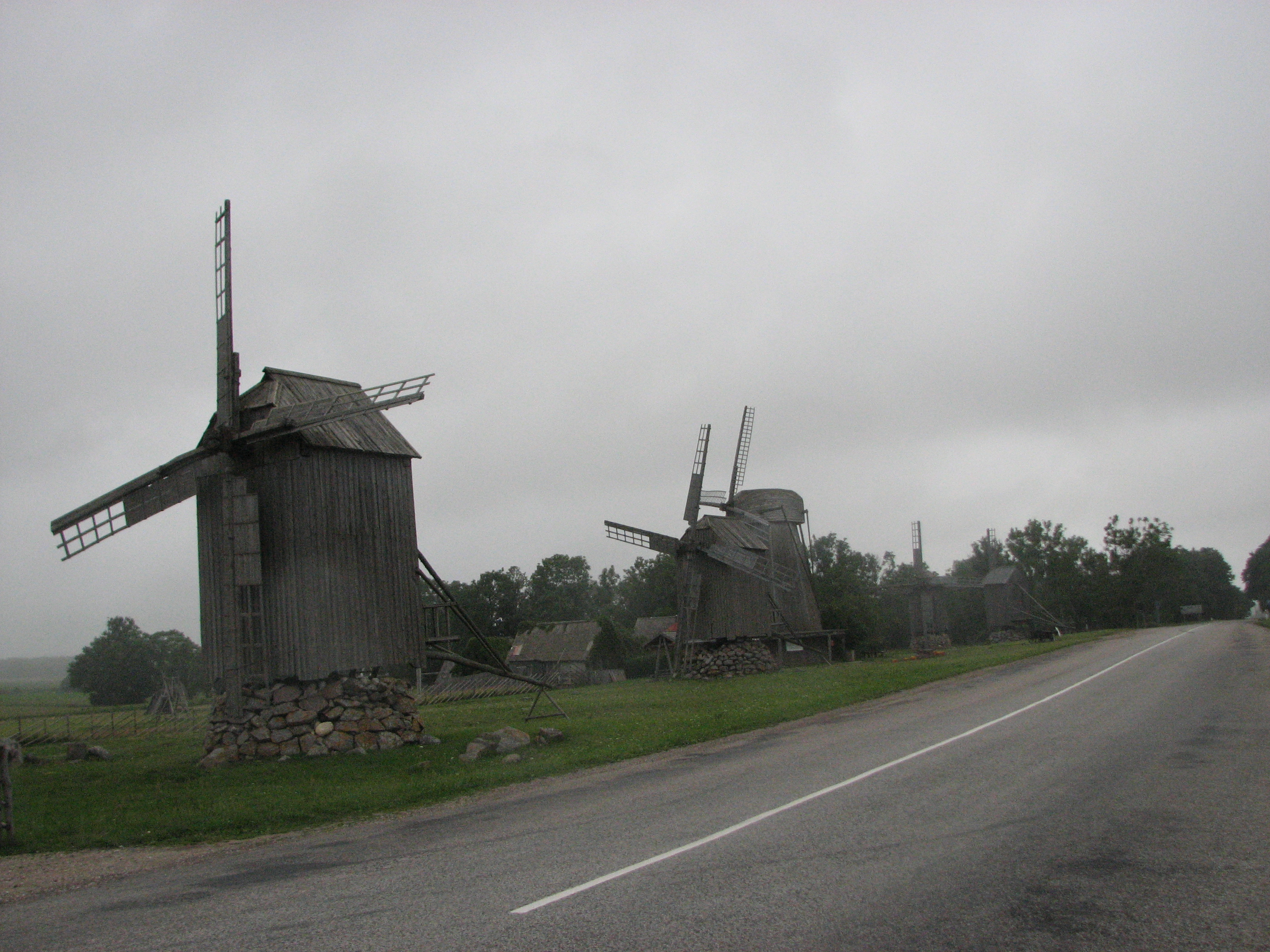 Windmills in Angla, Saaremaa, Estonia